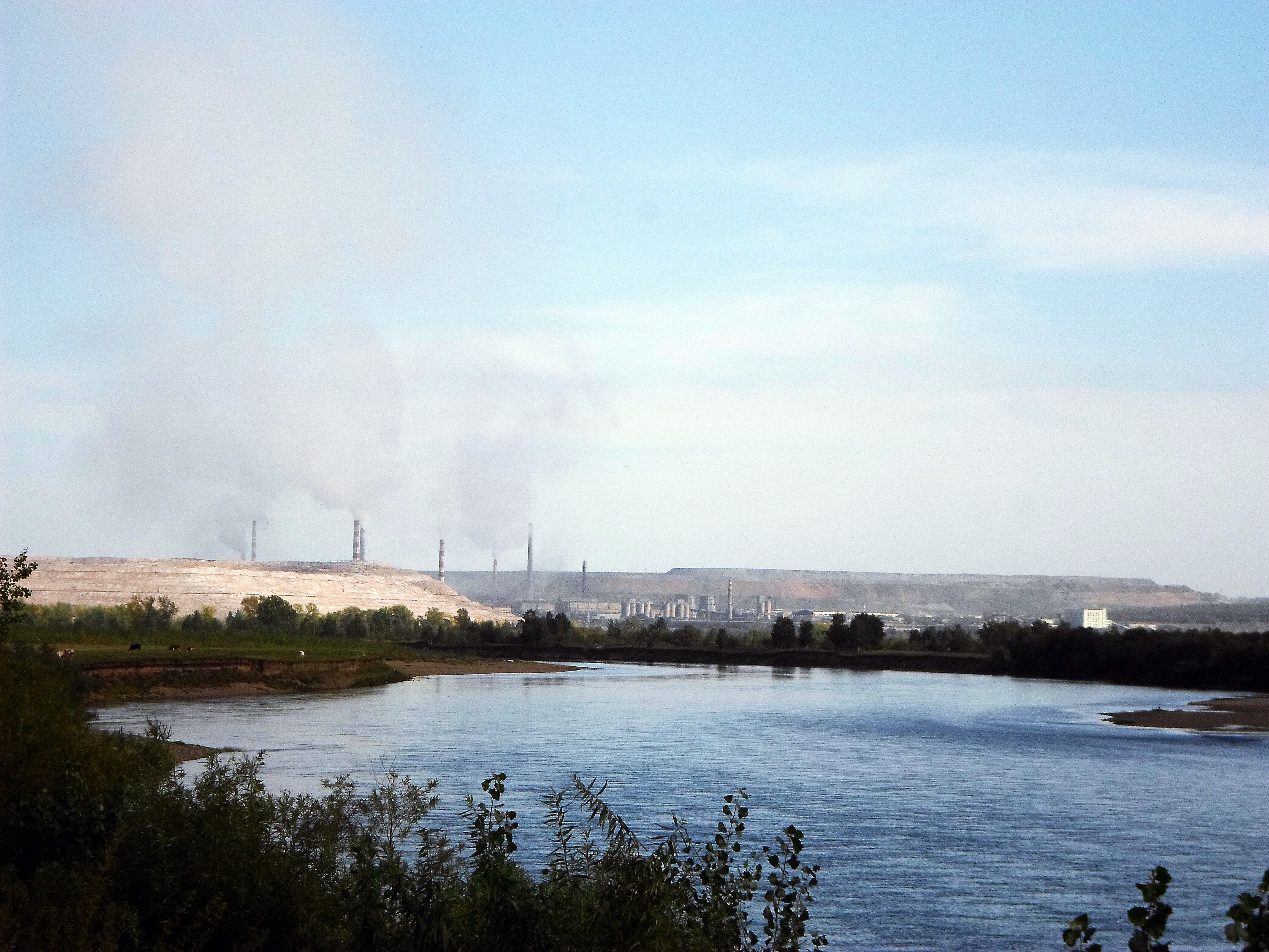 Река Чулым у села Белый Яр. Вид на Ачинский глинозёмный комбинат. Ачинский район Красноярского края.